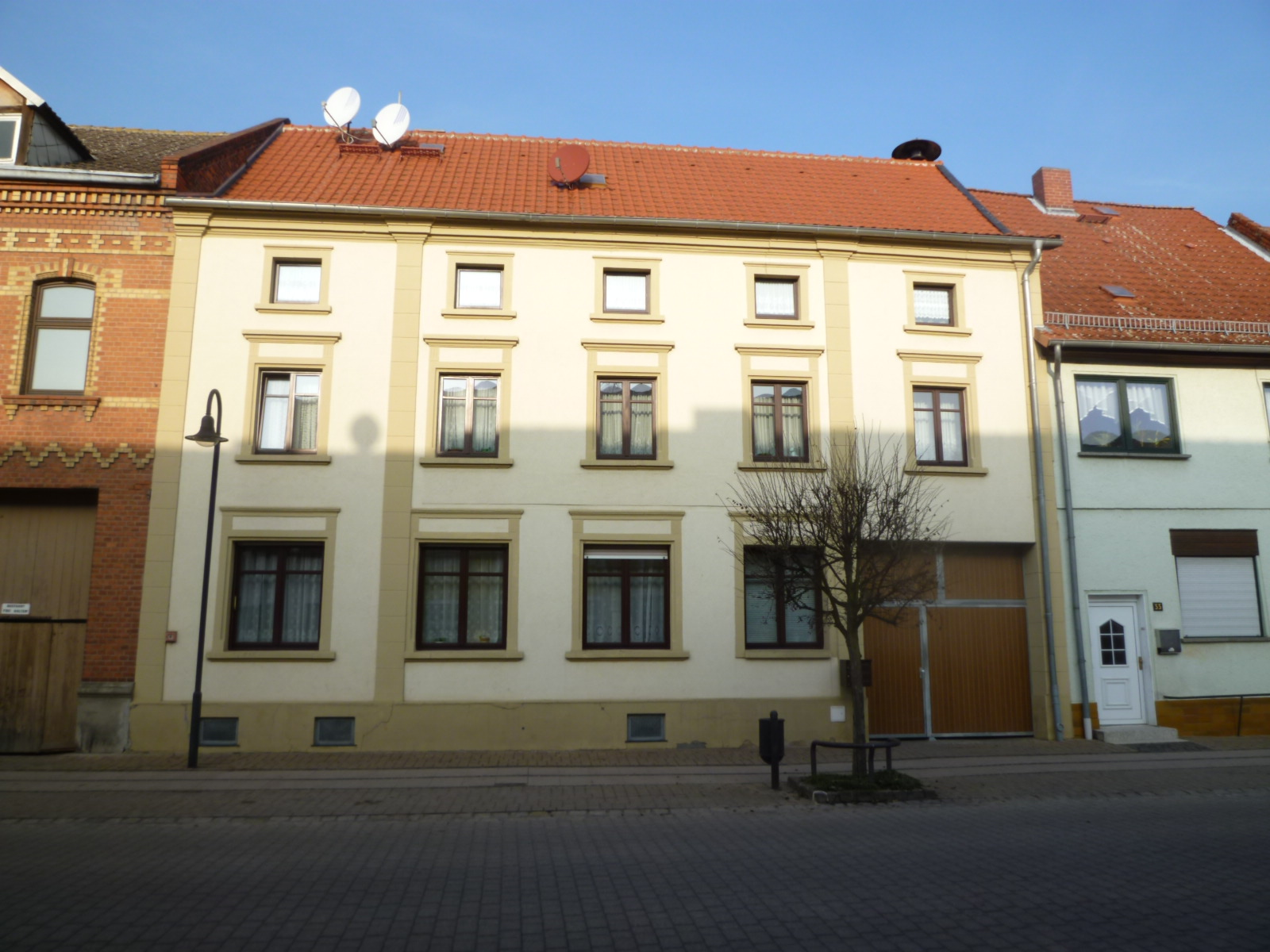 Das Karl-Liebknecht-Haus (K-L-Haus) im November 2011 in Calvörde (Landkreis Börde, Sachsen-Anhalt, Deutschland)